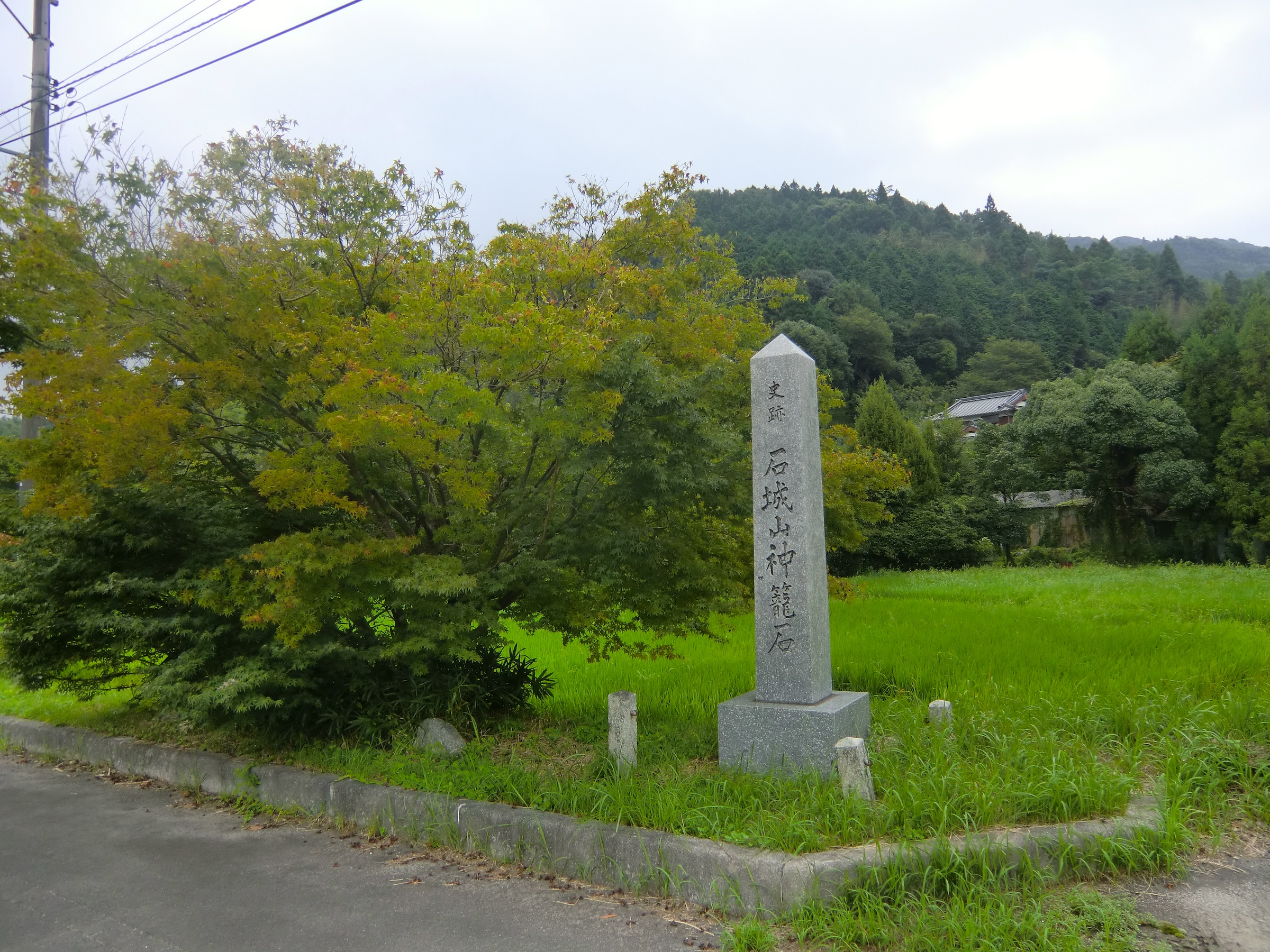 石城山神籠石（光市）に続く道沿いに建てられた石碑